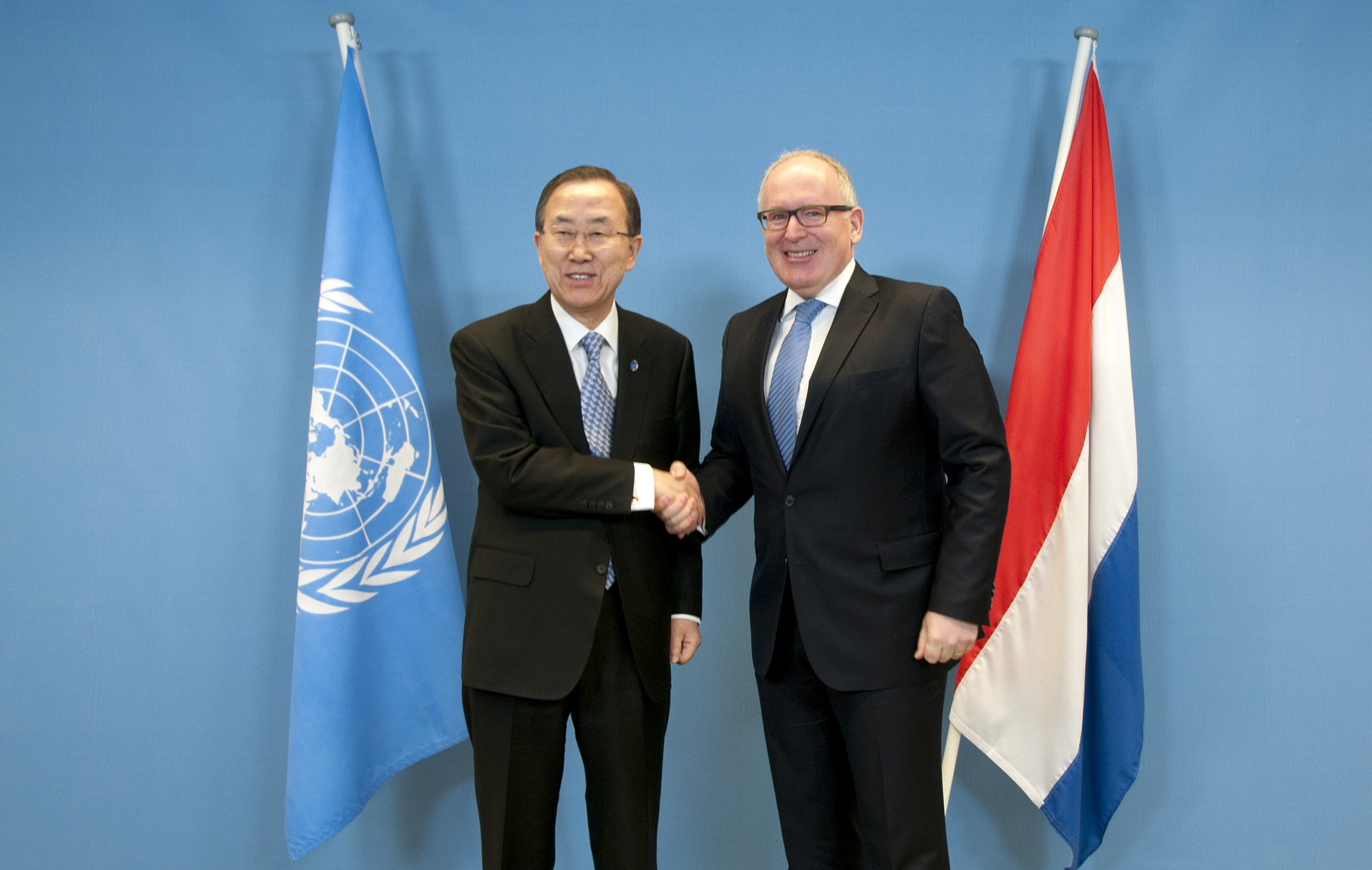 130408 Ban Ki-moon bij Timmermans 1951